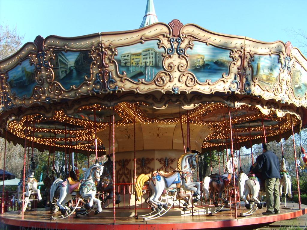 carrusel fantakids